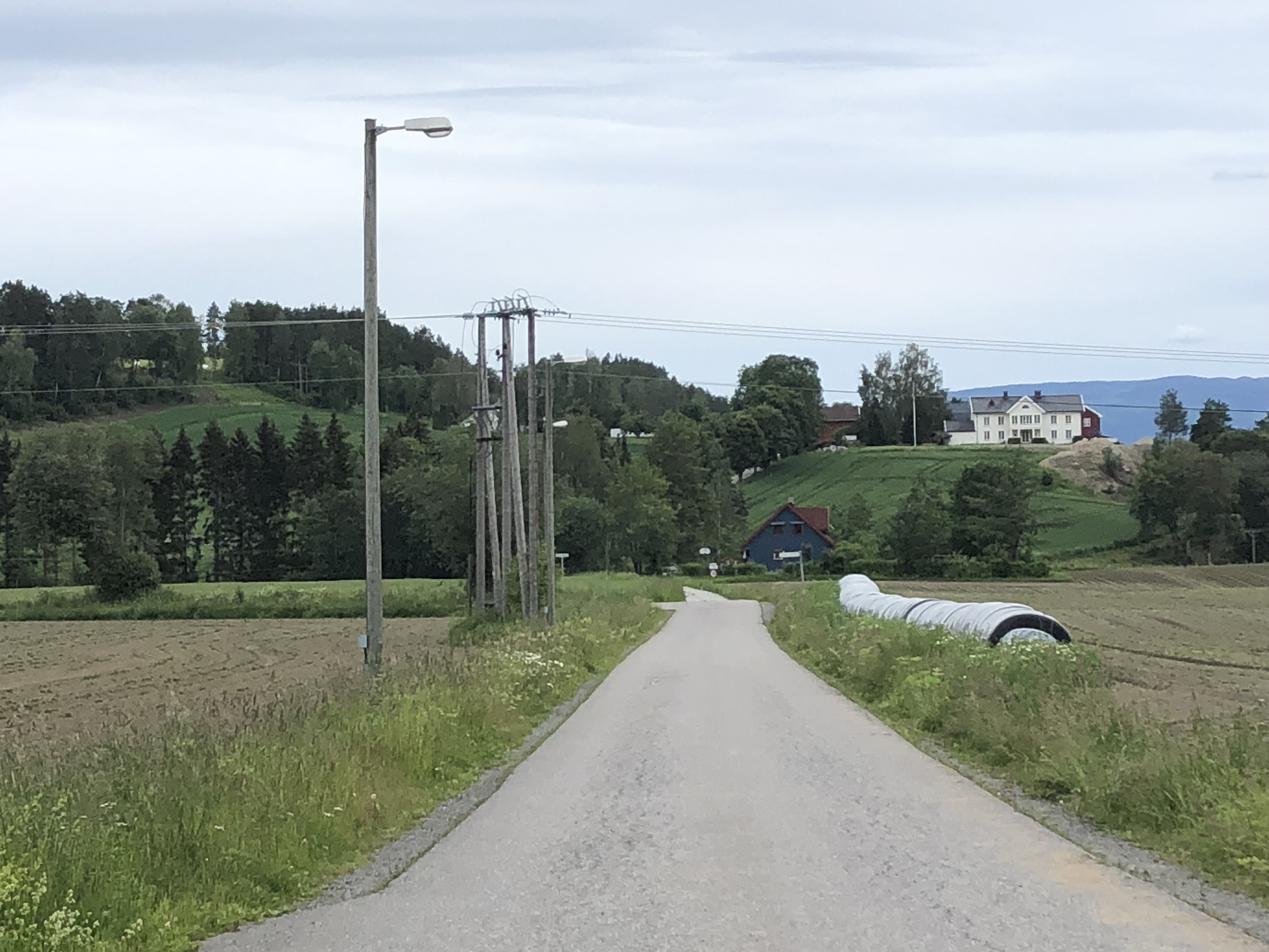 Froksveien, Ringerike, nær innkjøringen fra Norderhovsveien.